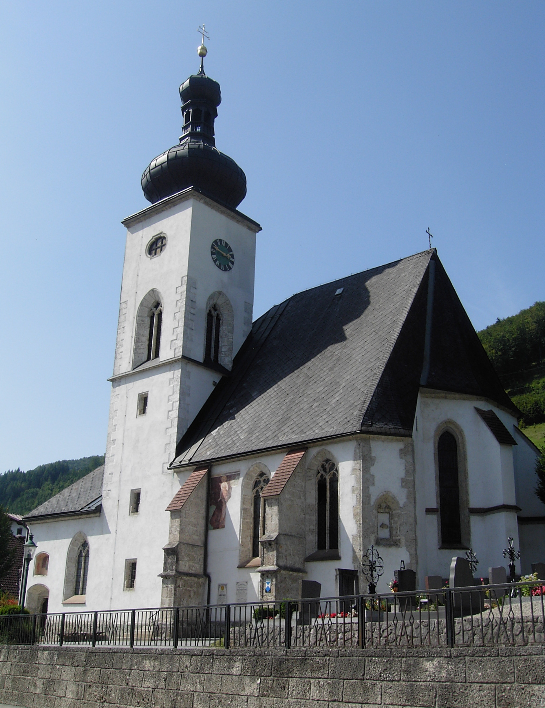 Gaflenz Pfarrkirche Markt, Ansicht von Süden